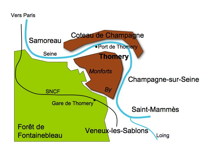 Géographie de la région de Thomery en Seine-et-Marne en France